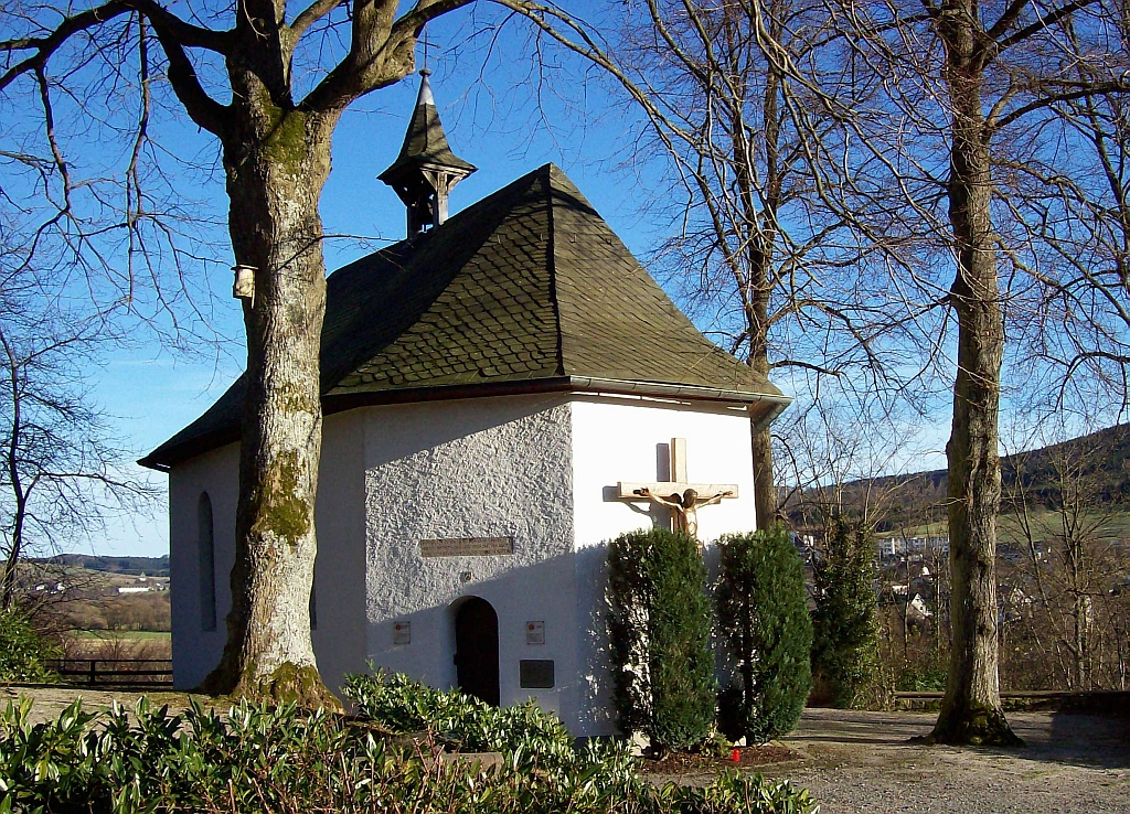 Denkmalgeschützte Kapelle "Auf dem Werth" (Anno 1682) in Schmallenberg (Germany). Vermutlich Stand um 1200 an dieser Stelle die "Smalen Burg". Im Hintergrund Kloster Grafschaft.